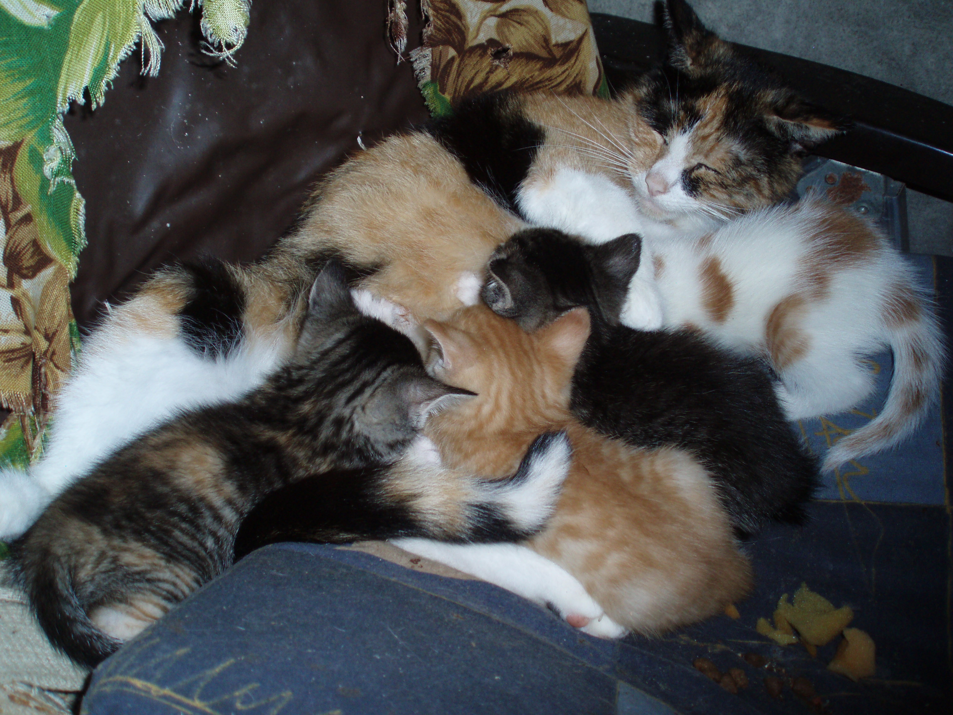 Poes die haar jongen zoogt.